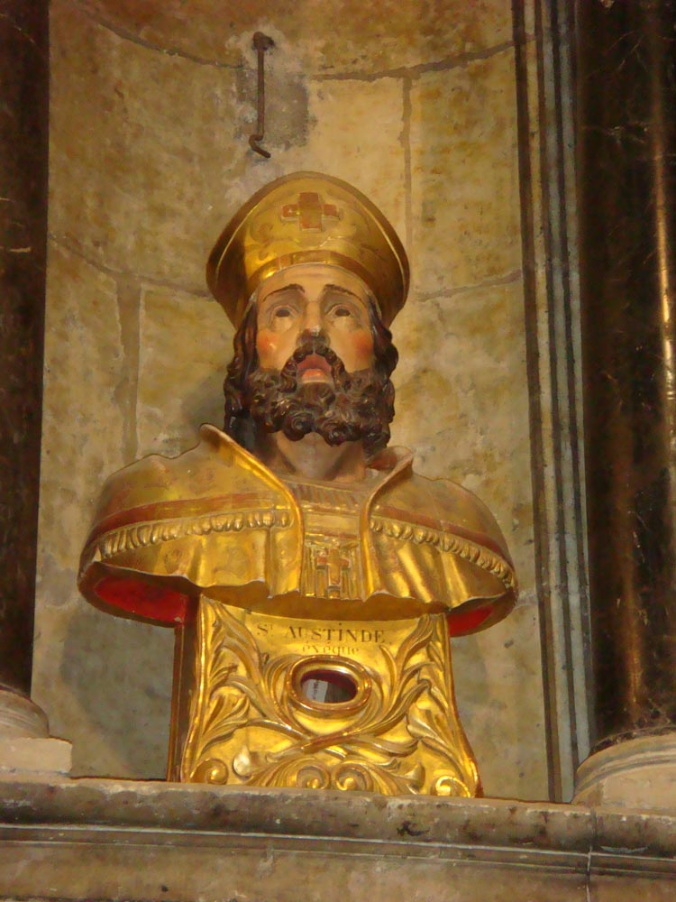 Buste de Saint-Austinde évêque d'Auch, situé dans une niche à gauche du retable du grand Chœur